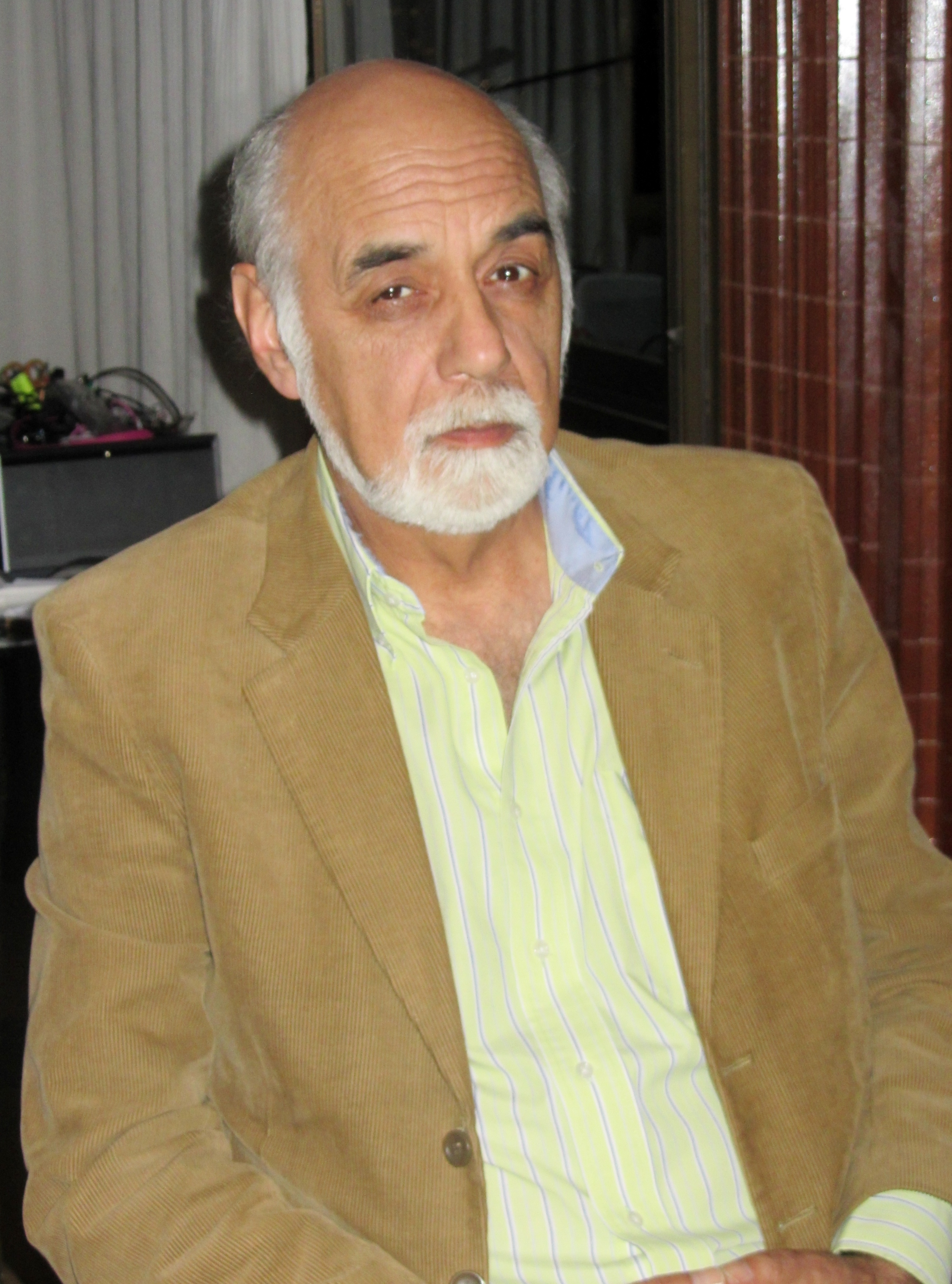 El poeta chileno Juan Antonio Massone en el departamento de la profesora de Castellano, Patricia Arze, Santiago, 2015